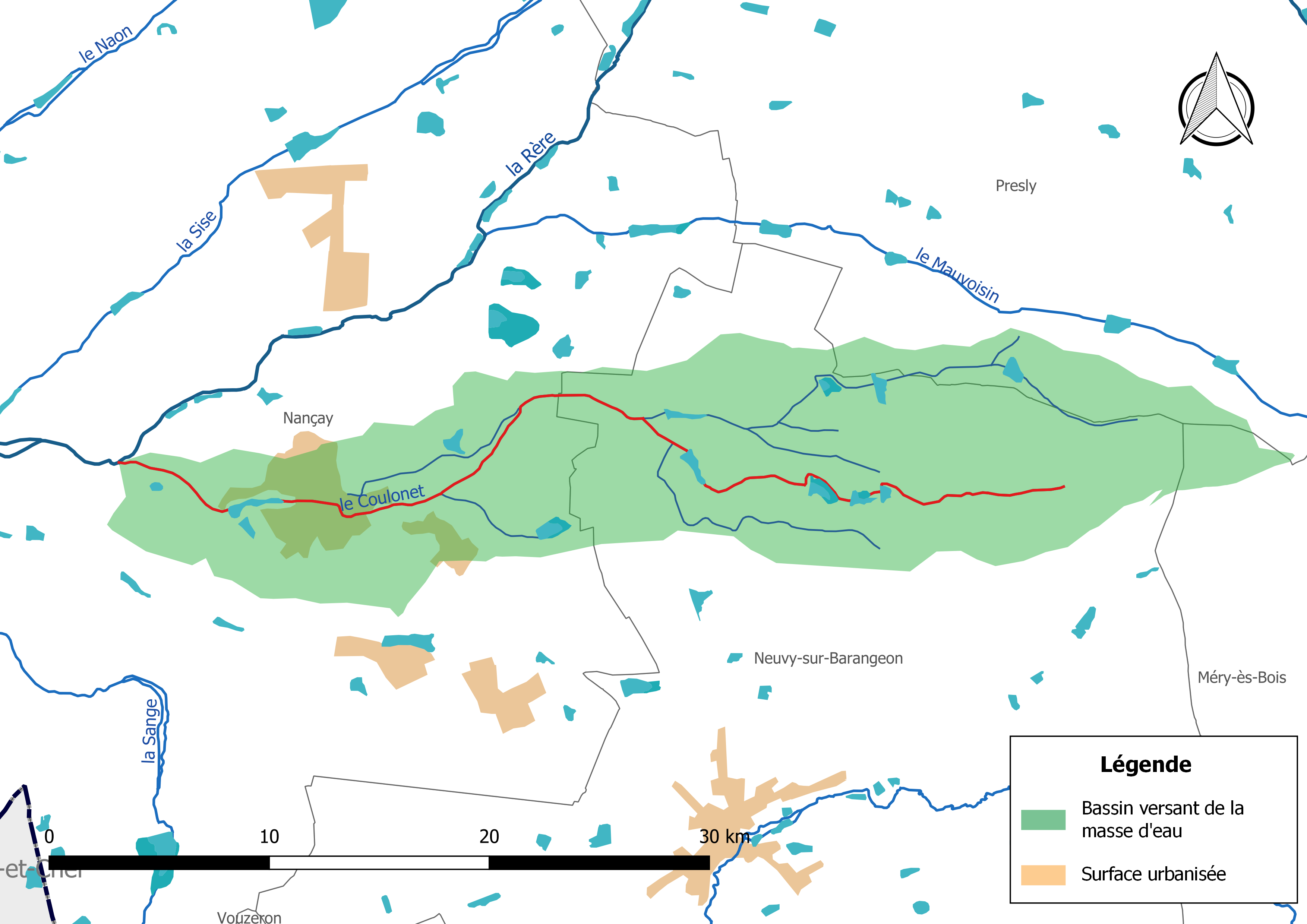 Carte de la masse d'eau « FRGR1552 », avec mise en exergue du cours d'eau « la Taisonne » (en rouge).